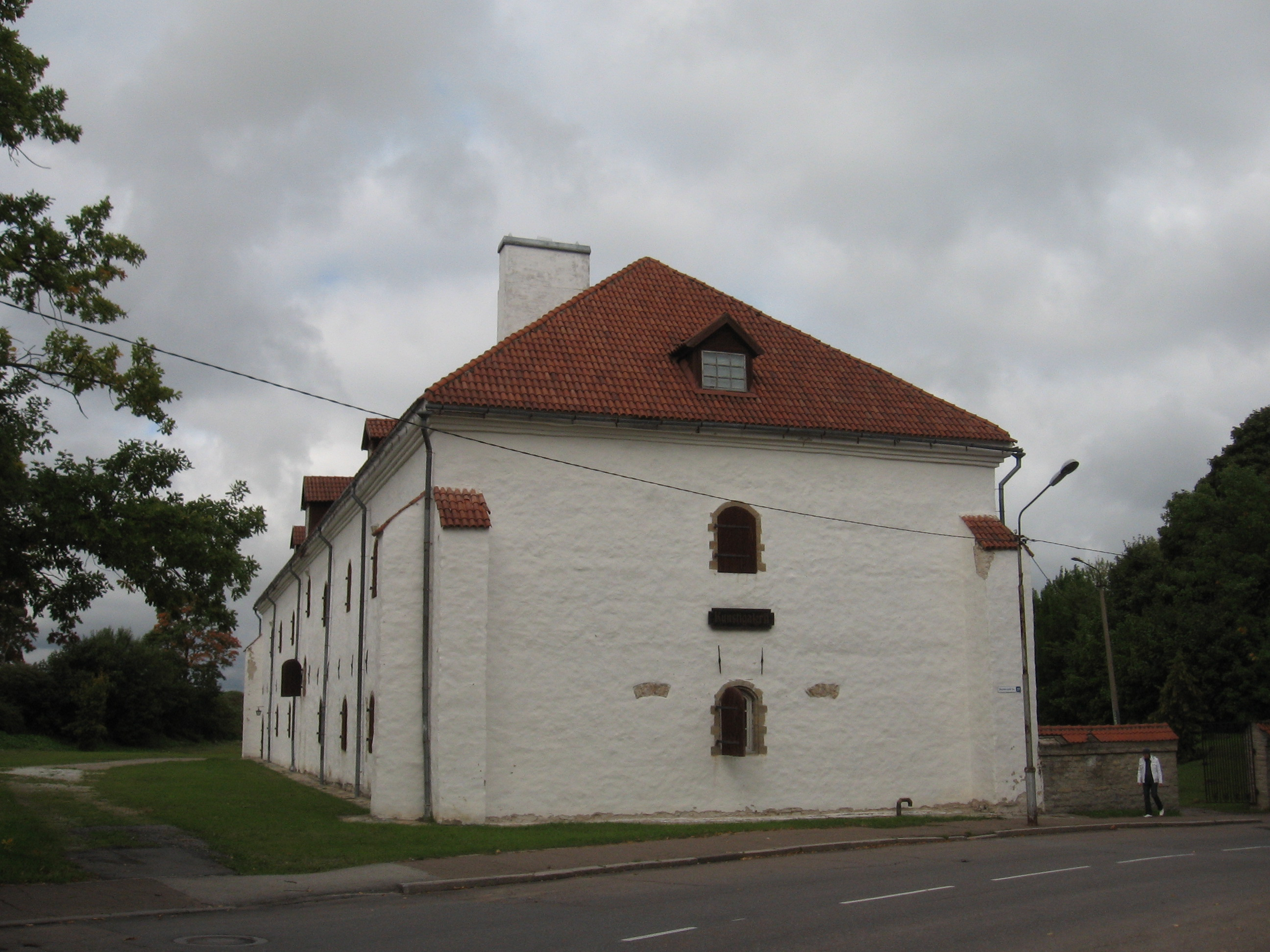 Magasiait Narvas